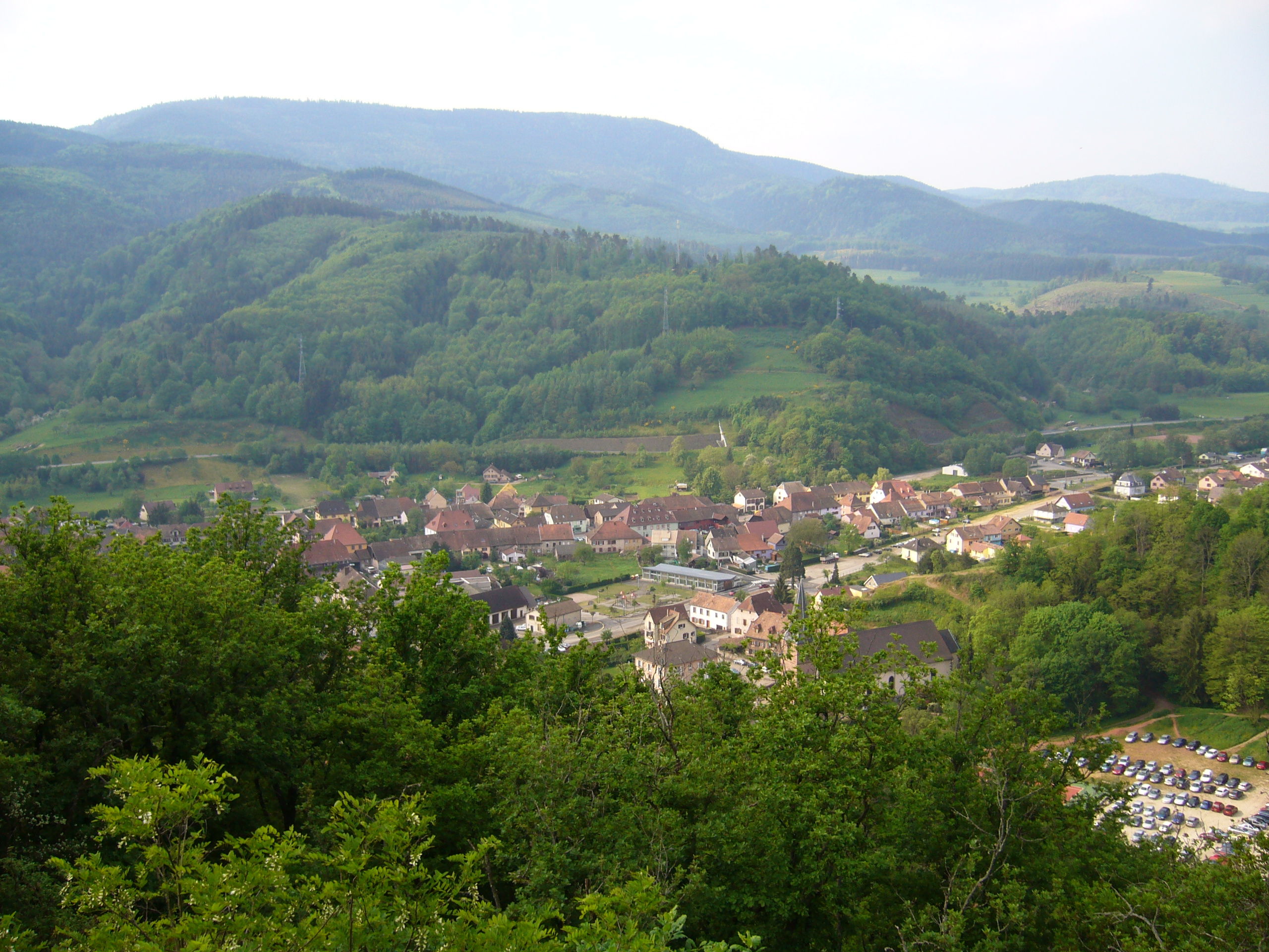 Lièpvre 069.JPG